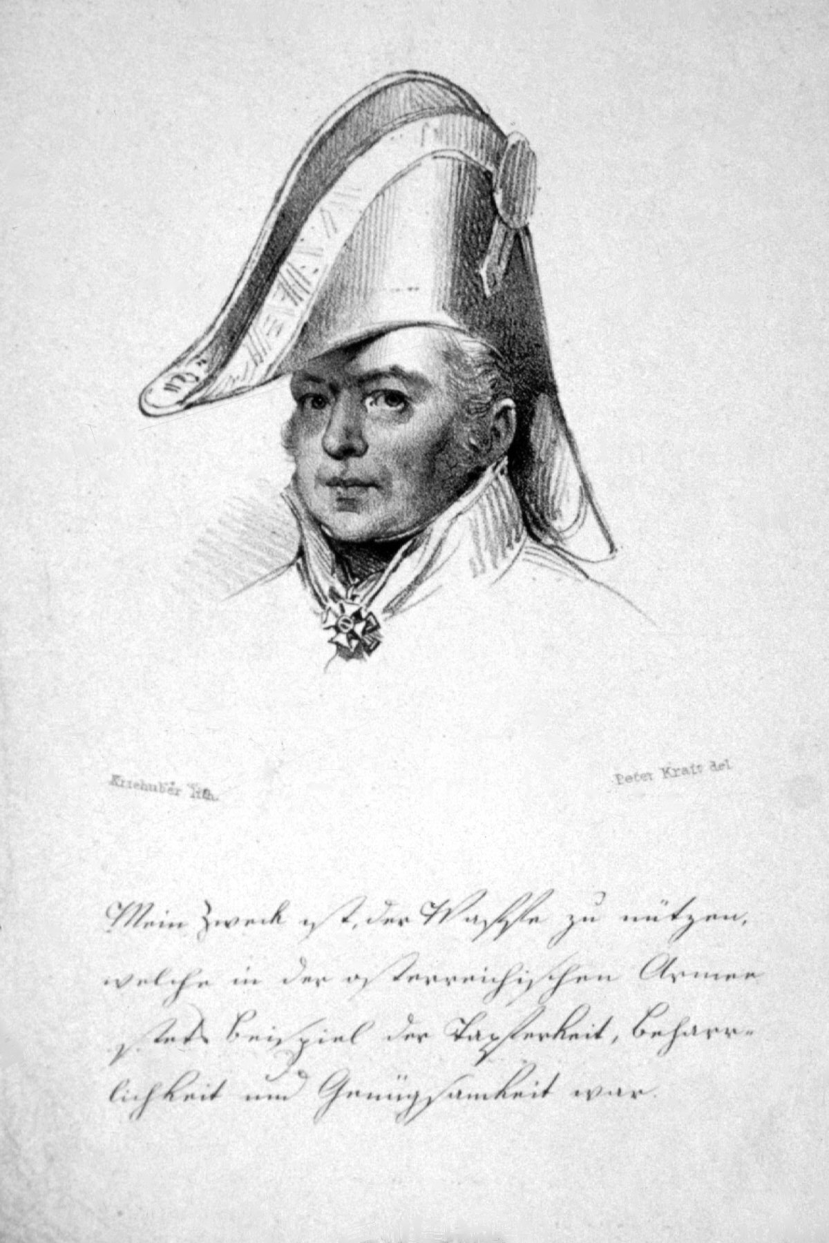 Litografie od Josef Kriehuber, původní kresba Johann Peter Krafft.